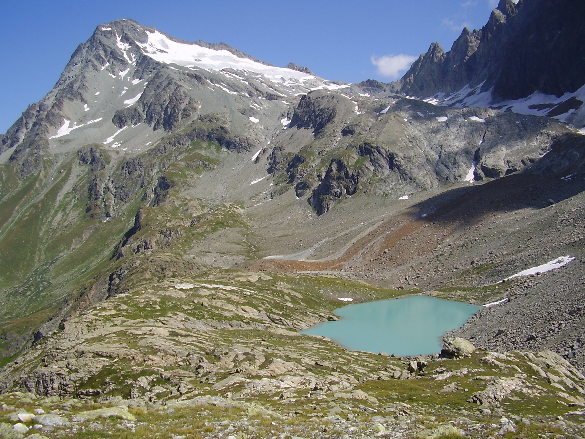 Il Mont Gelè visto dal Bivacco Regondi.